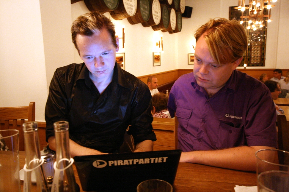 Julian Assange och Rick Falkvinge skriver pressmeddelande